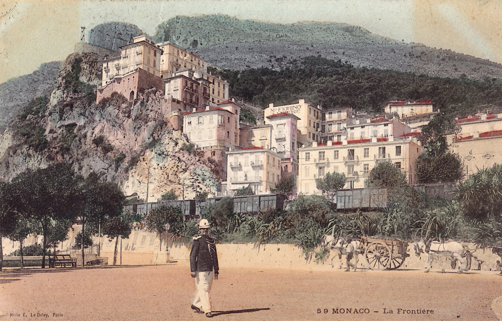 Carte postale ancienne éditée par ELD, n°59 : MONACO - La Frontière